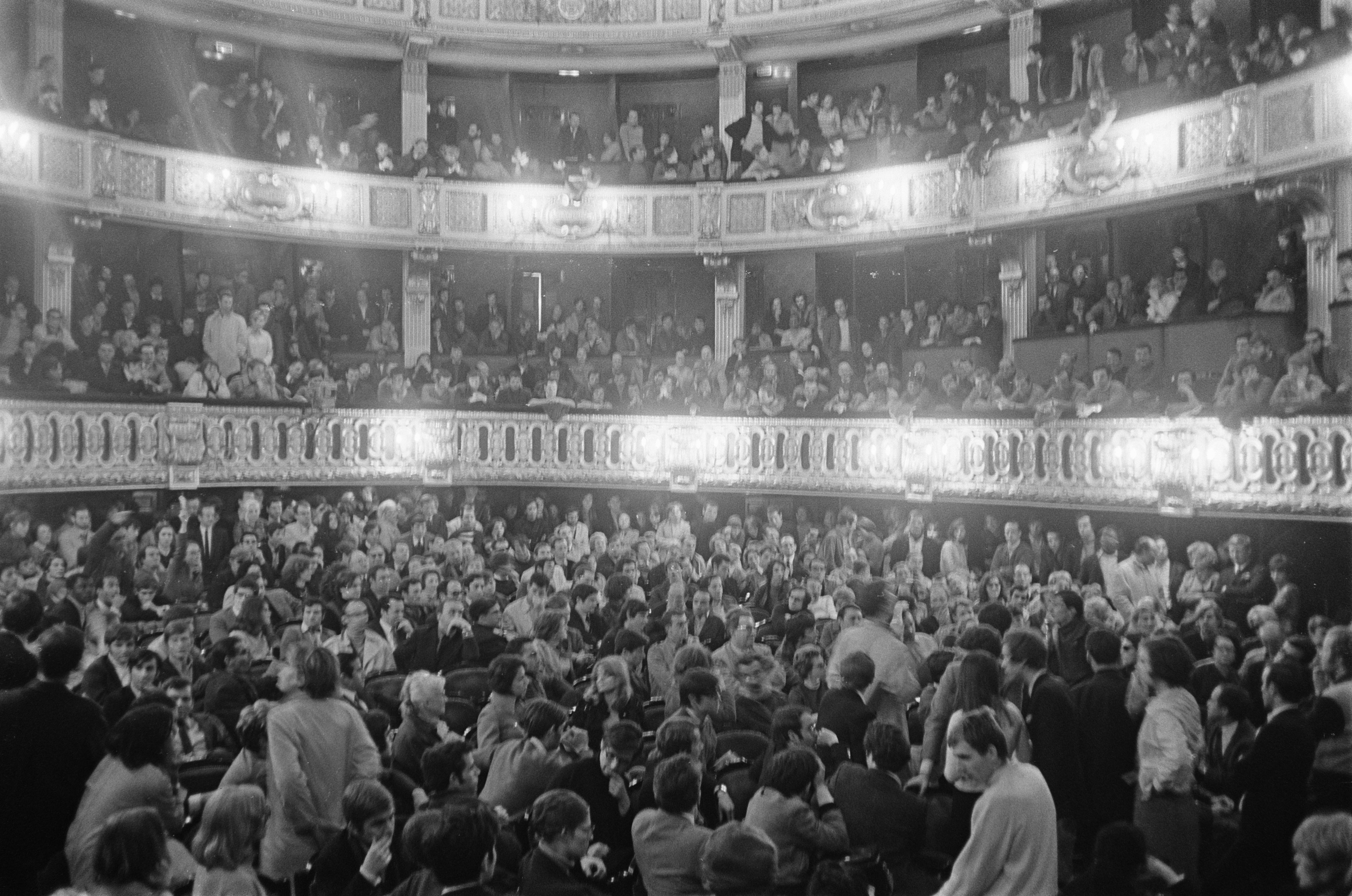 Collectie / Archief : Fotocollectie Anefo Reportage / Serie : [ onbekend ] Beschrijving : Frankrijk. Theater Odeon bezet door studenten Datum : 28 mei 1968 Locatie : Frankrijk Trefwoorden : STUDENTEN, bezettingen Fotograaf : Koch, Eric / Anefo Auteursrechthebbende : Nationaal Archief Materiaalsoort : Negatief (zwart/wit) Nummer archiefinventaris : bekijk toegang 2.24.01.05 Bestanddeelnummer : 921-3964